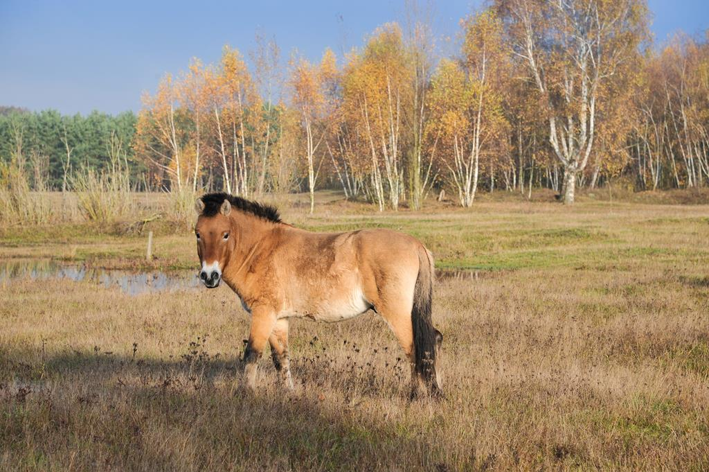 Hengst im Semi Reservat Hanau